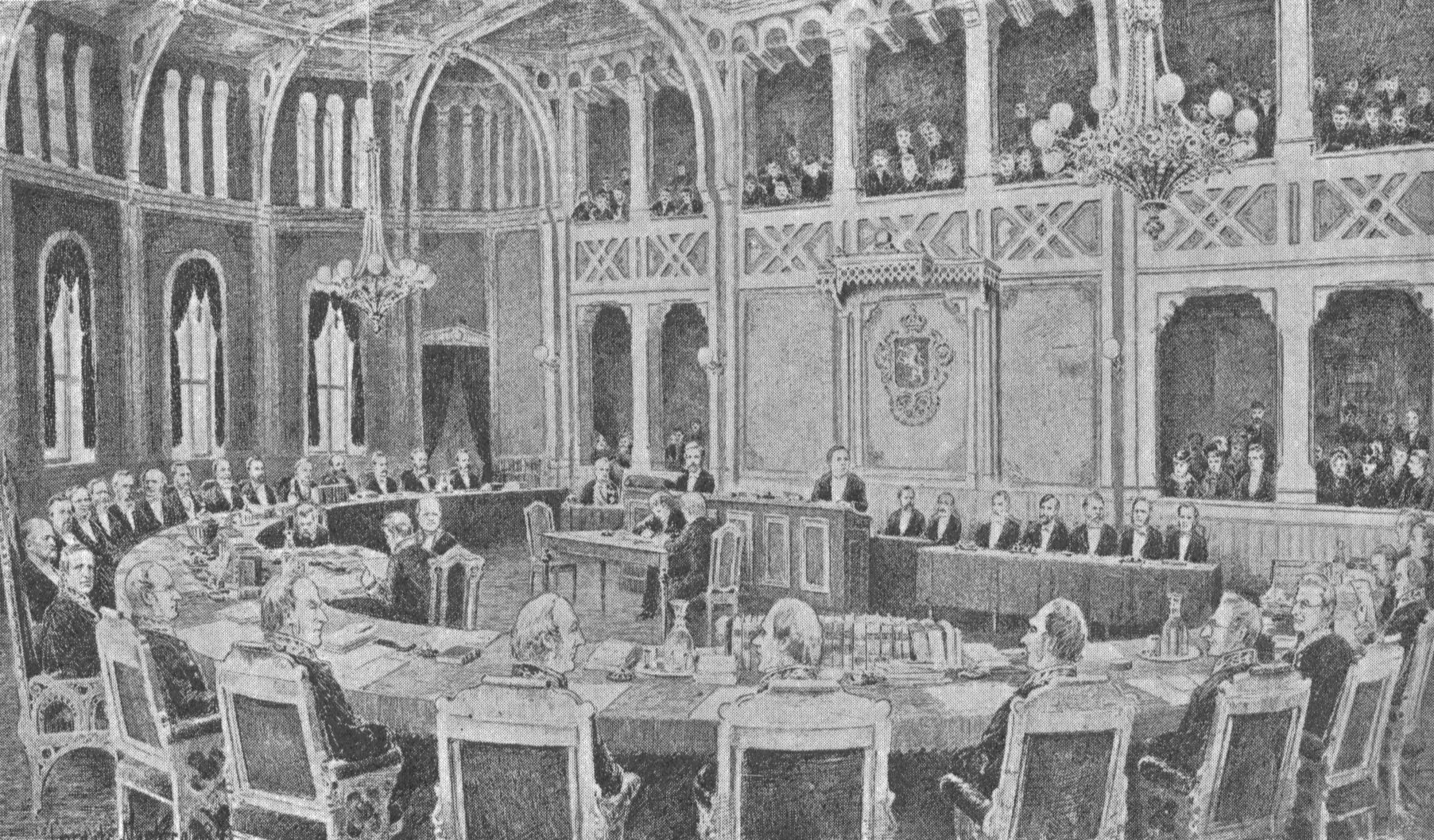 Riksretten i 1884. Tegning av Lorentz Norberg.